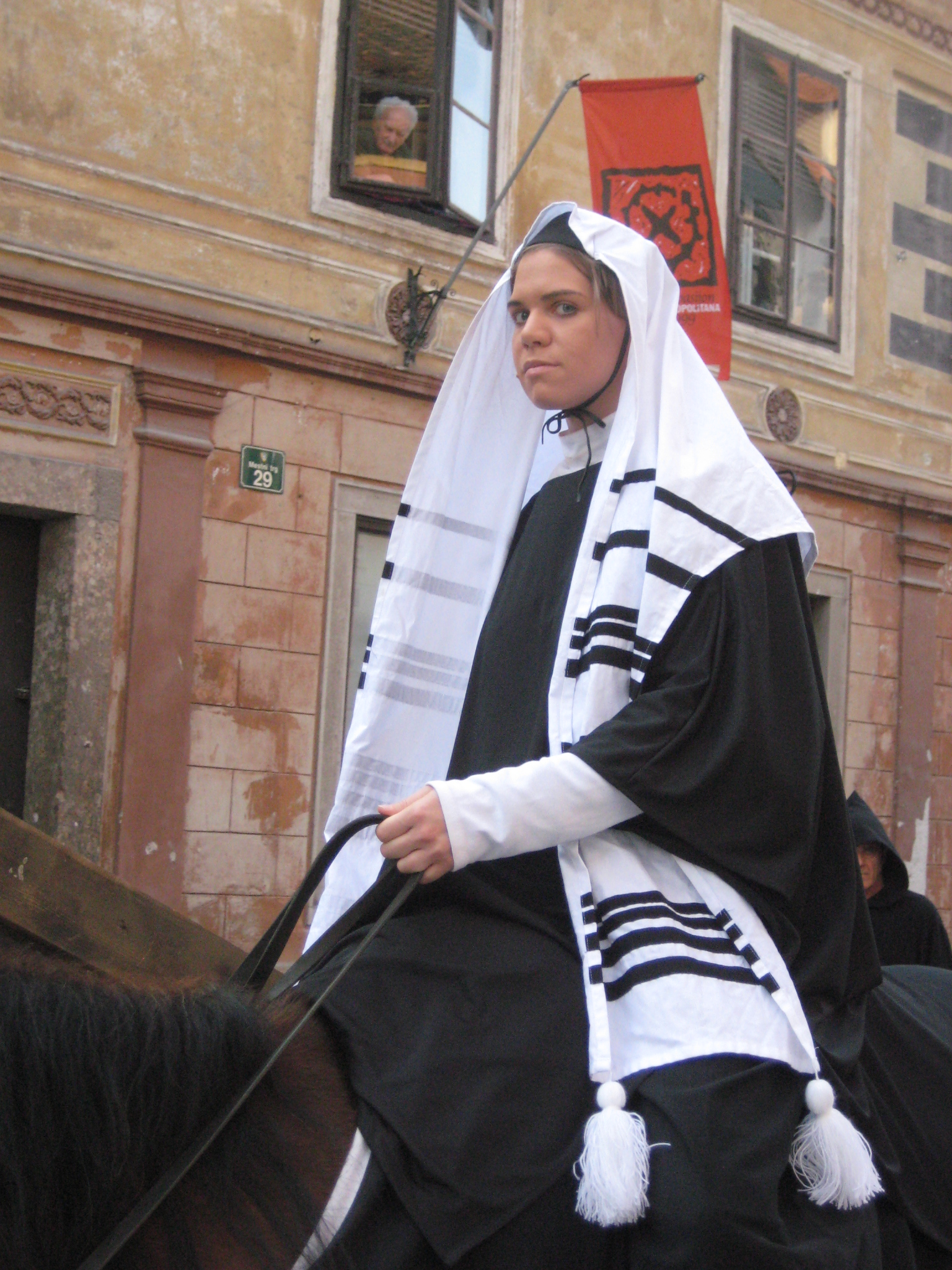 Škofjeloški pasijon (Processio Locopolitana), izvedba 2009 v Škofji Loki